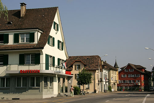 Dorfzentrum Ettiswil